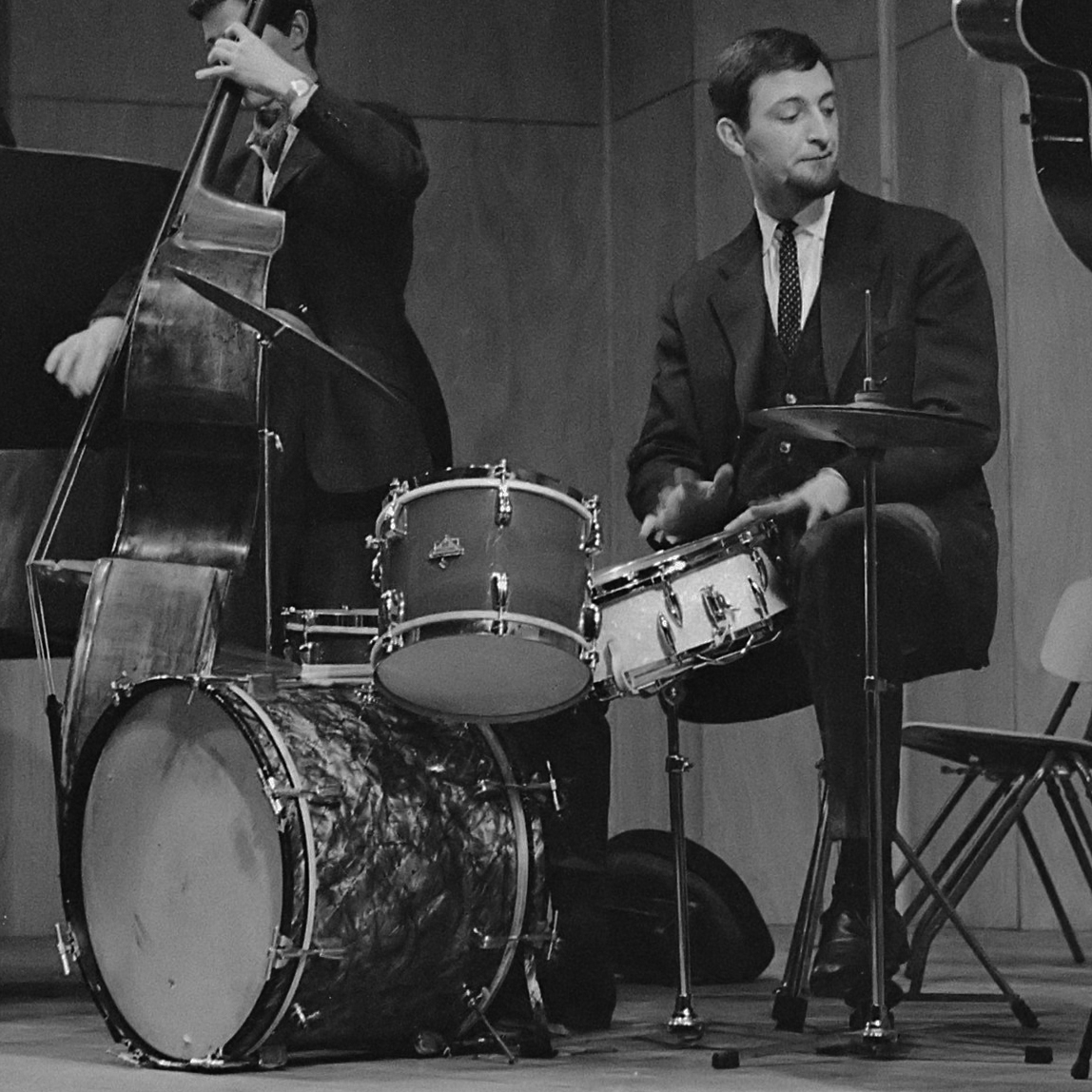 Jazz-concert AMVJ gebouw te Rotterdam 10 januari 1960